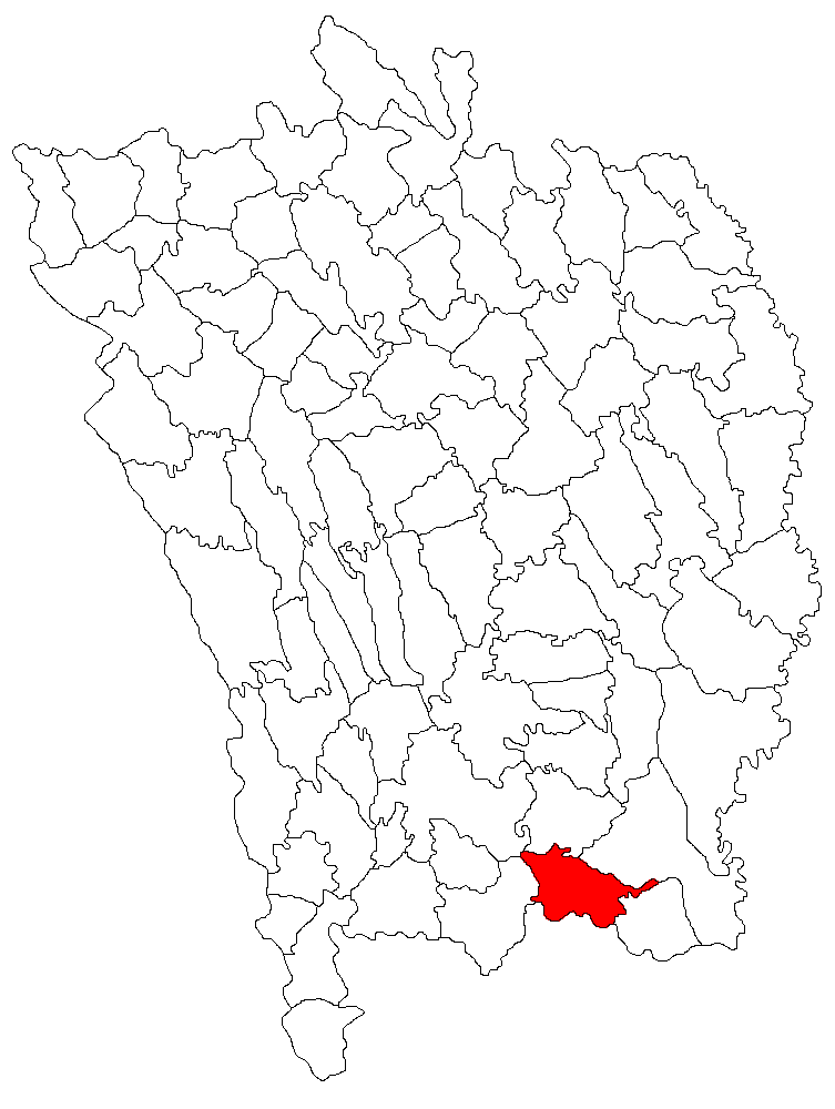 Categorie:Hărţi ale judeţului Vaslui